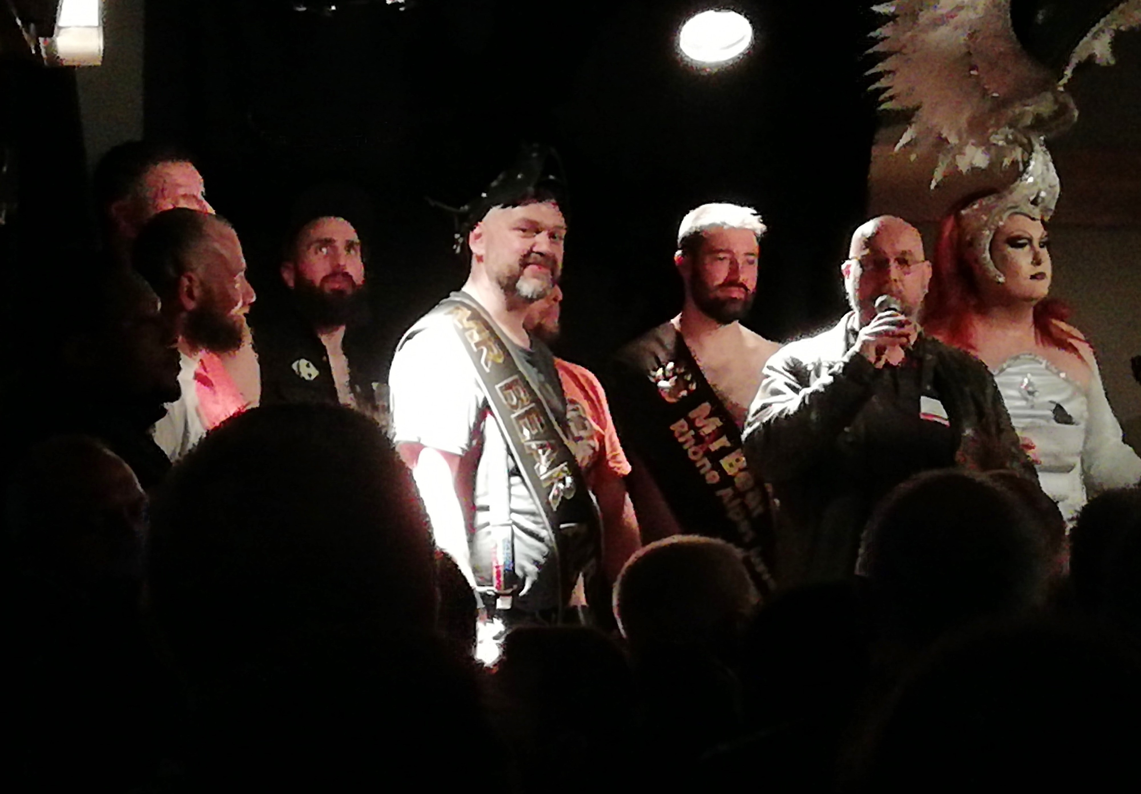 L'élection de Mr Bear Auvergne Rhône Alpes 2019, à La Bobine, organisé par Grrrnoble Bear Association, en collaboration avec Grrrizzlyon, dans le cadre de la quinzaine contre le racisme et les discriminations de la Ville de Grenoble